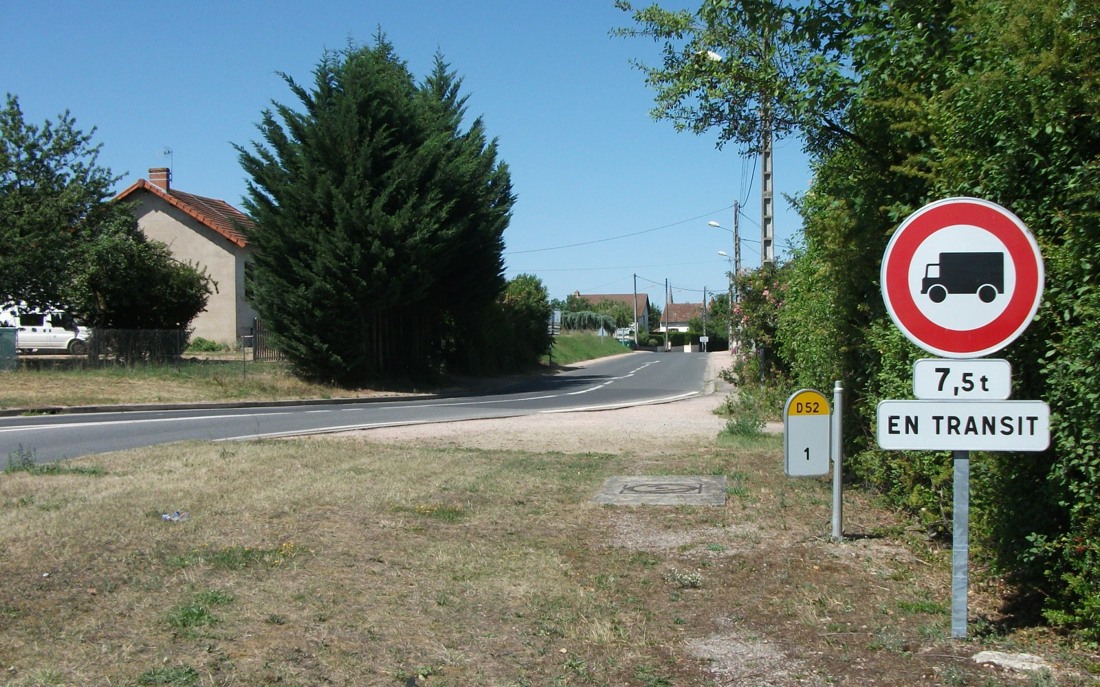 Cette route, la départementale 52 de Saint-Germain-des-Fossés vers Lapalisse, est interdite aux poids lourds de plus de 7,5 tonnes en transit. Lieu : Champs Rosier, commune de Seuillet, Allier, Auvergne, France. Panneaux : tous trois sont des Sécurité et signalisation 2010